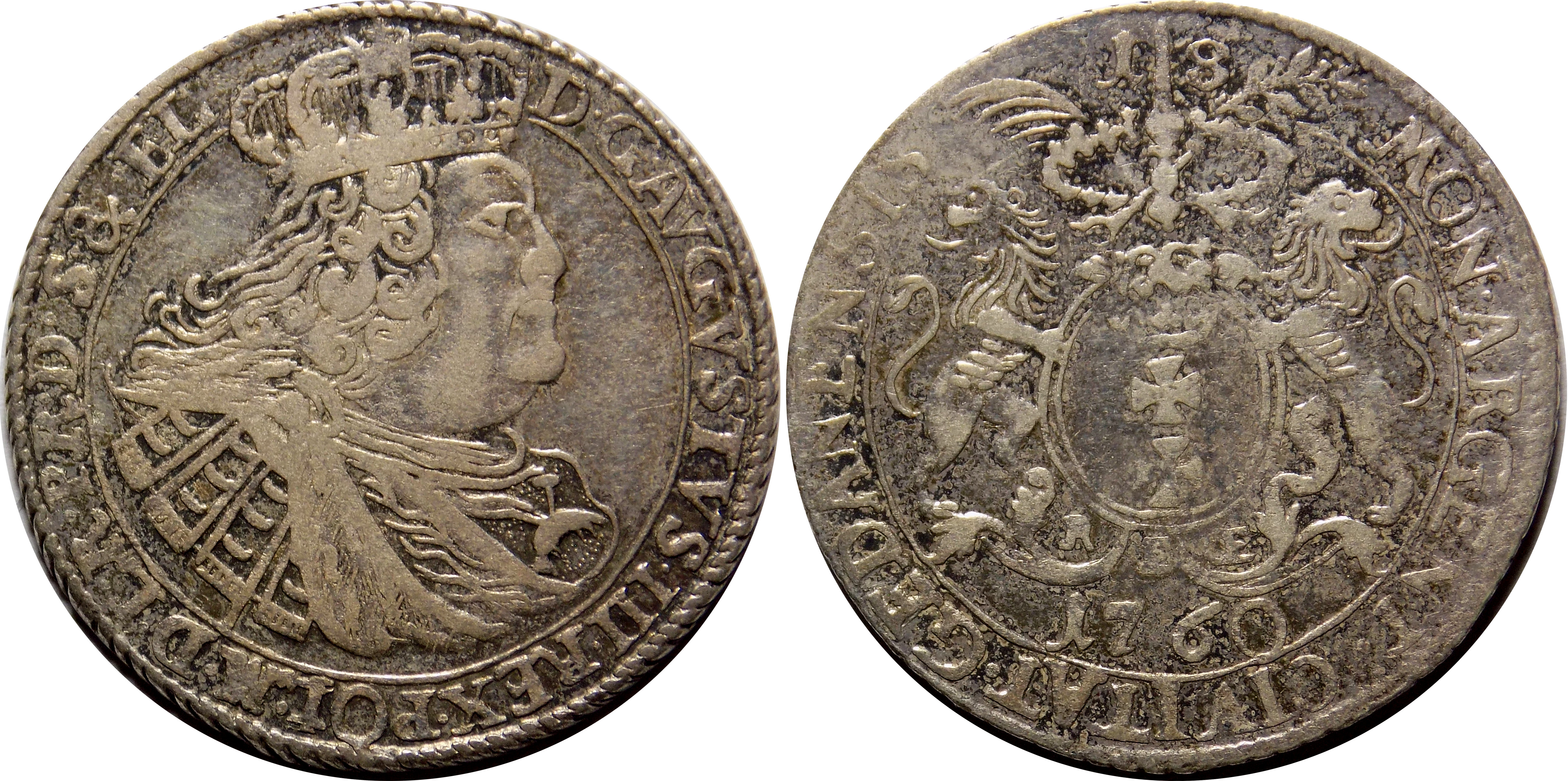 Ort miejski Gdańsk 1760